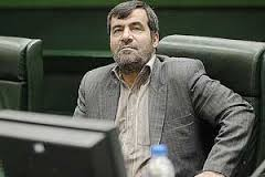 مجلس شورای اسلامی دوره هشتم